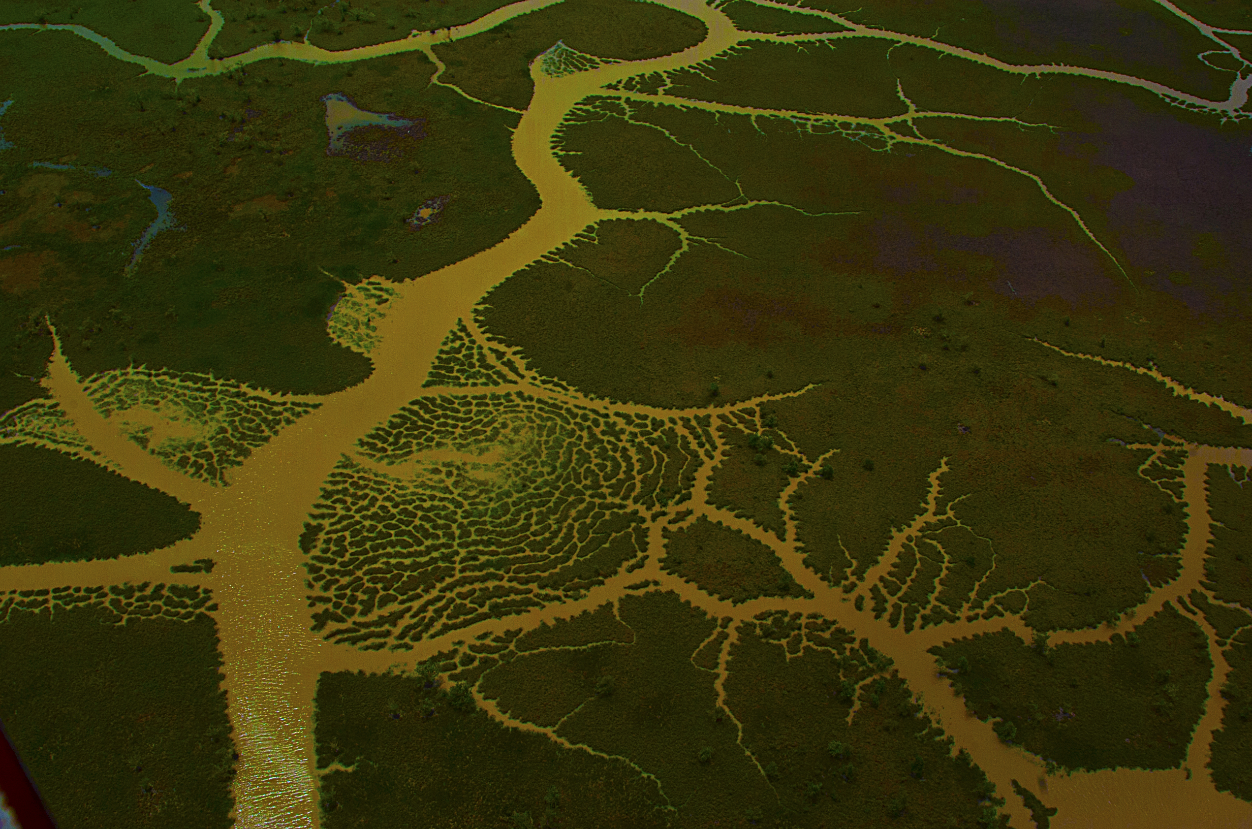 O Delta do Parnaíba e suas belas paisagens do mundo. Está localizado entre os estados do Maranhão e Piauí tendo em Parnaíba sua porta de entrada